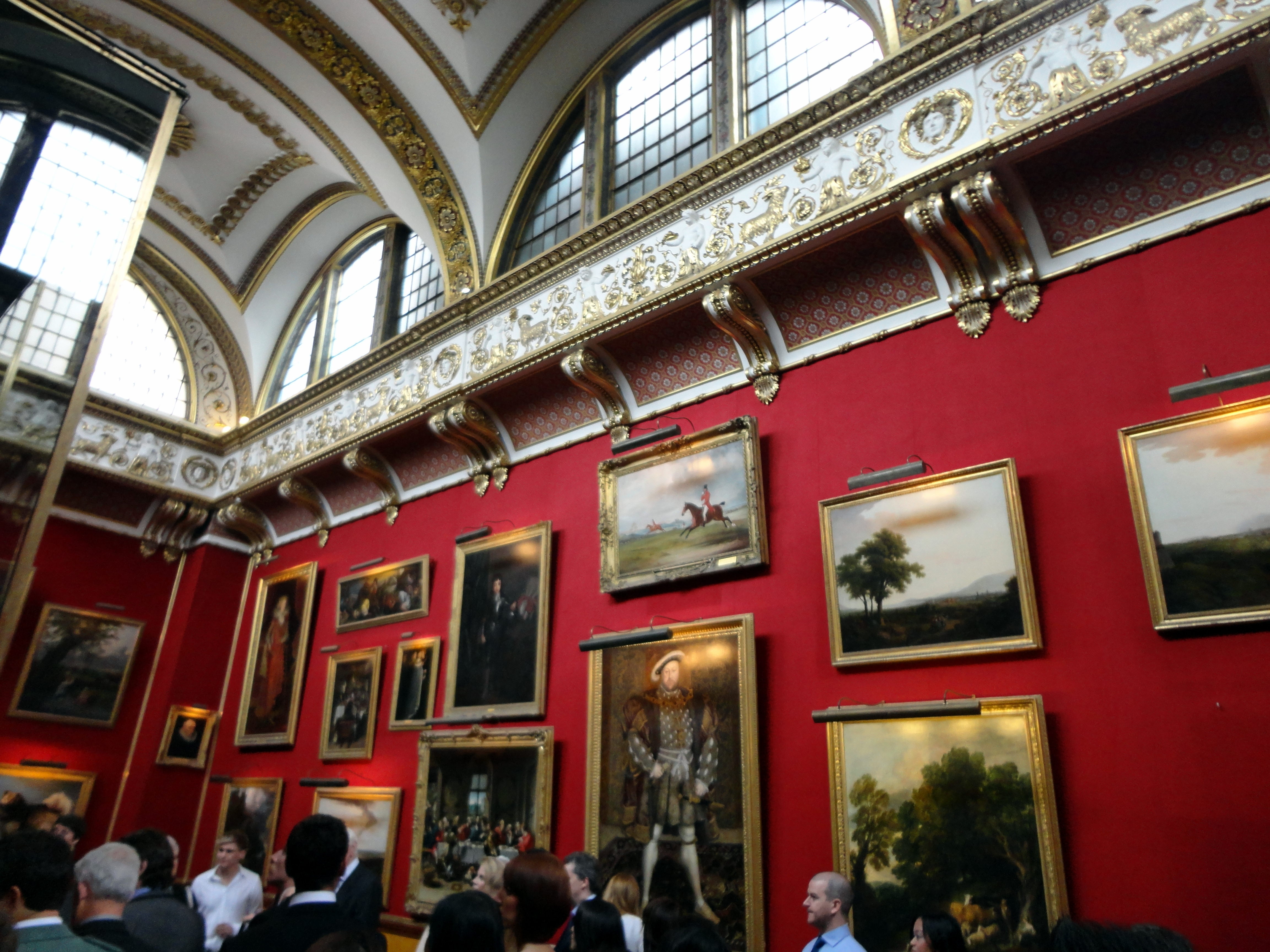 Belvoir Castle